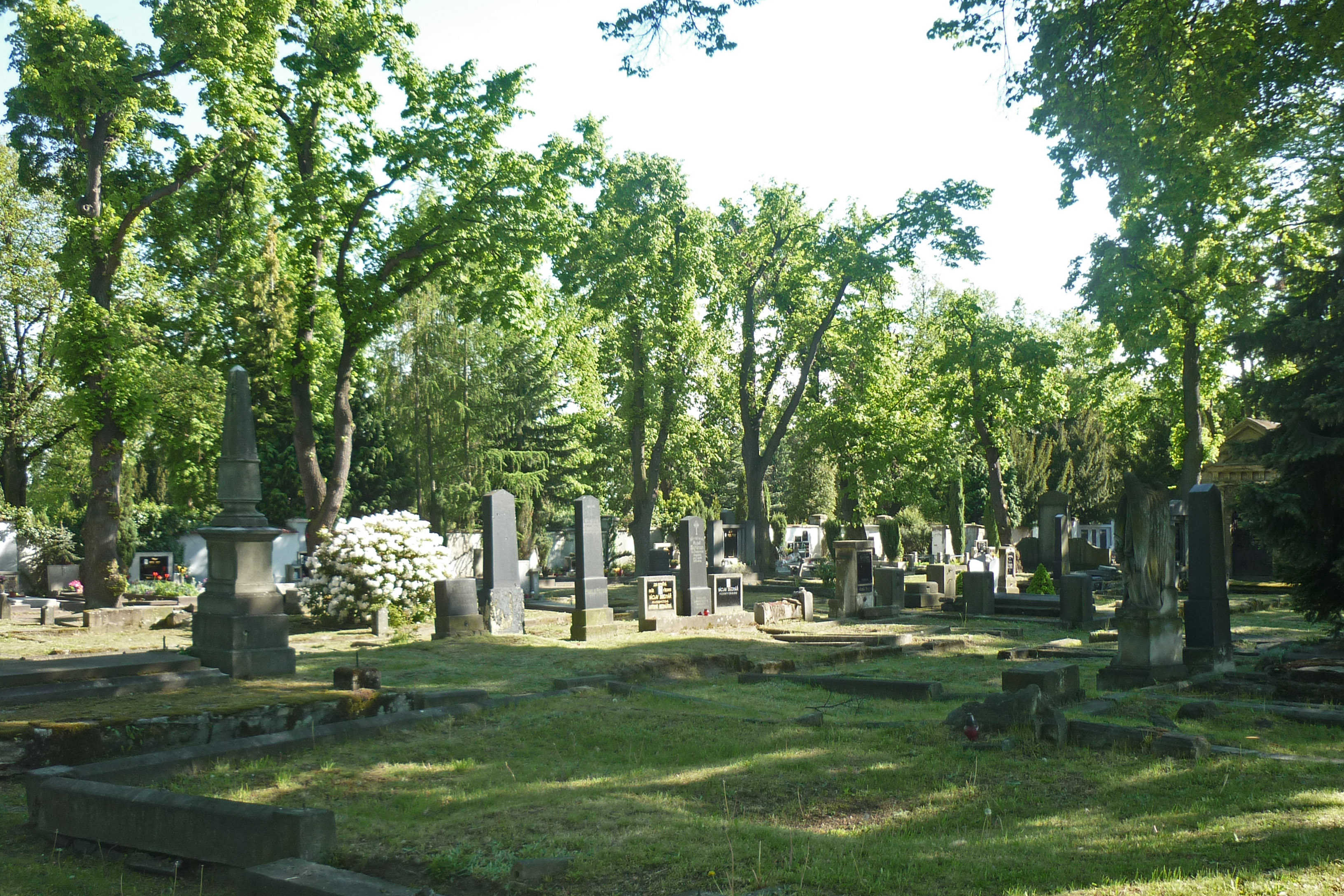 Der Friedhof in Komotau (Chomutov)